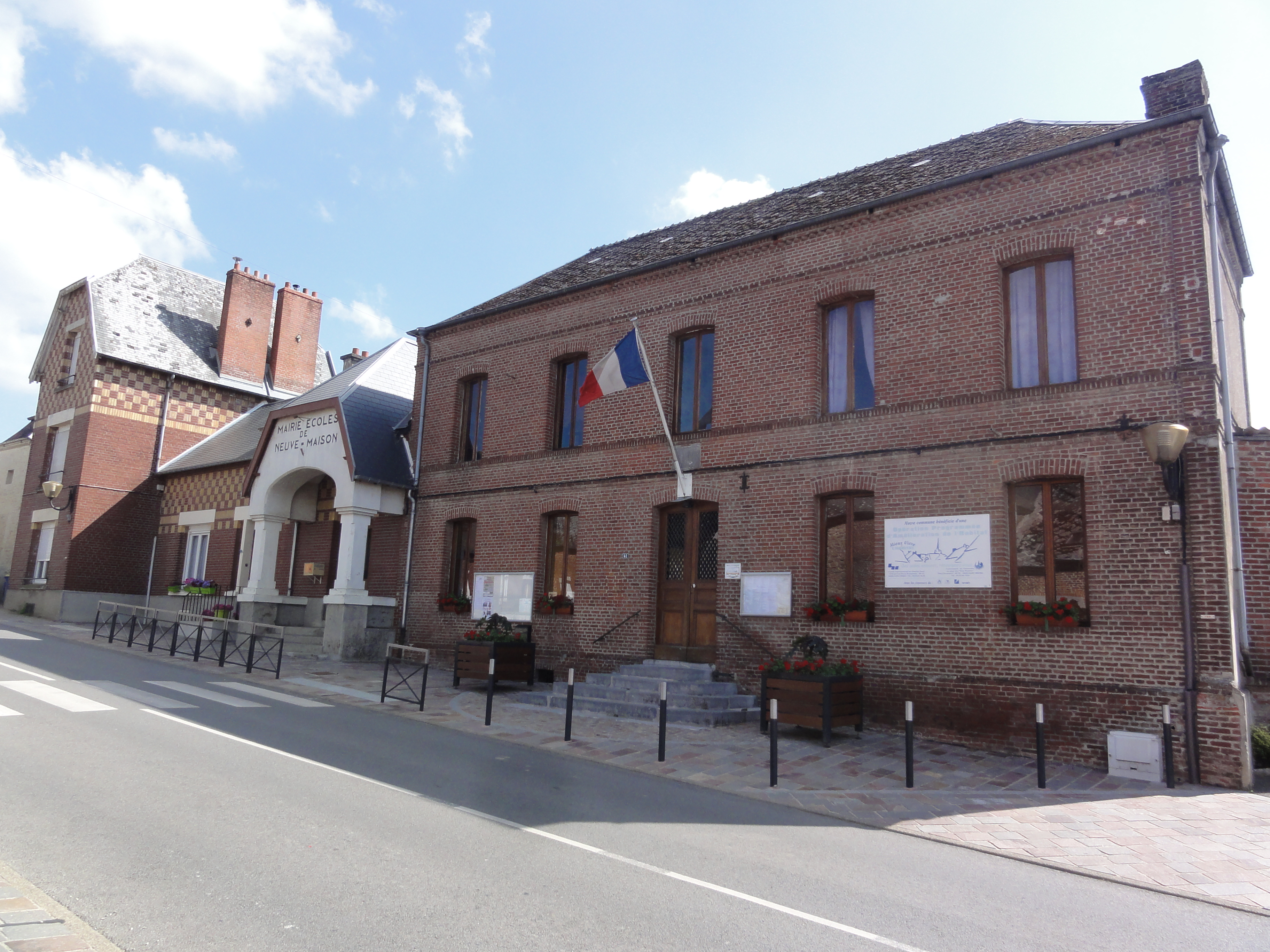 Neuve-Maison (Aisne) mairie-école